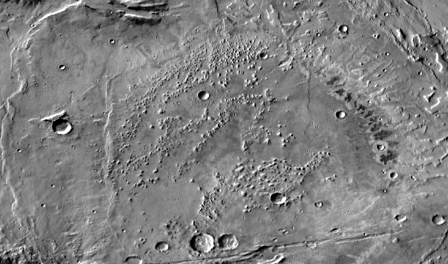 Simois Colles (THEMIS Day). Marte.